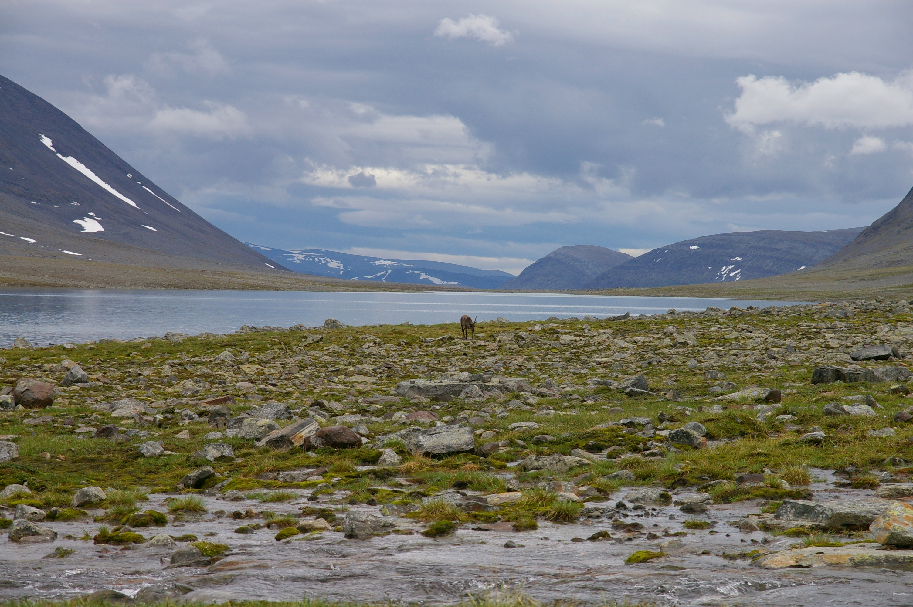 Sjön Reaiddájárvi (äldre stavning Stuor-Räitajaure ) i dalen stuor reaiddávággi i Kiruna kommun i Sverige. Några kilometer från sjön ligger fjällen Nallo, Vaktposten och Tjäktjahjälmen. Sjön fylls på med smältvatten från Unna Räitadalens glaciärer. Sjön ligger längst upp i dalen Stuor Reaiddájárvi som sluttar både norr och söder ut. Sjön har därför två utlopp, ett söder ut och ett norr ut. Båda med namnet Stuor Räitajåkka (äldre stavning). Båda utloppen är markerade med flödespilar bort från sjön både på lantmäteriets karta och hos SMHI.